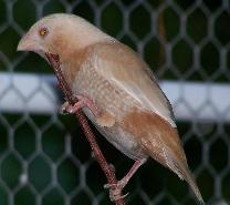 Mutazione passero del giappone